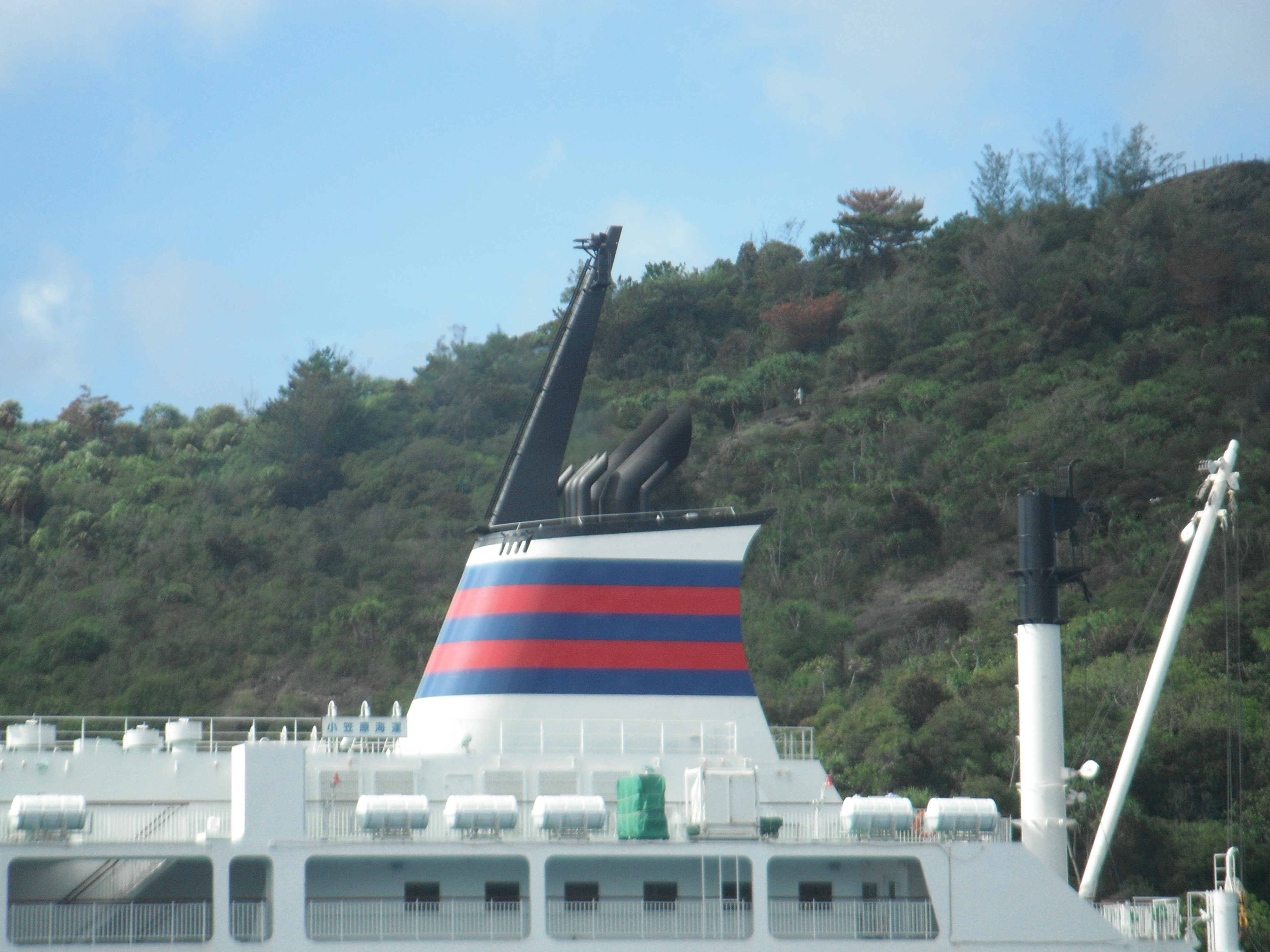 貨客船３代目おがさわら丸の煙突 20160918に撮影